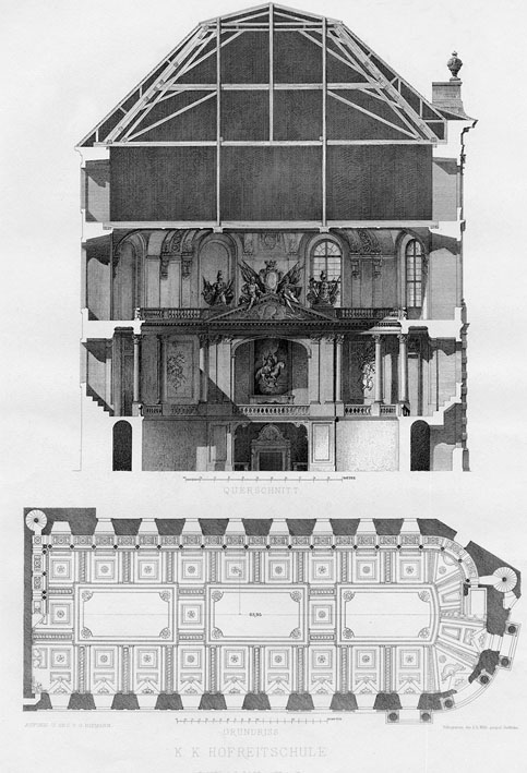 Querschnitt und Grundriss der Winterreitschule, erbaut 1728–34 durch Joseph Emanuel Fischer von Erlach (In: Georg Niemann, Palast-Bauten des Barockstils in Wien, Wien 1883ff.)